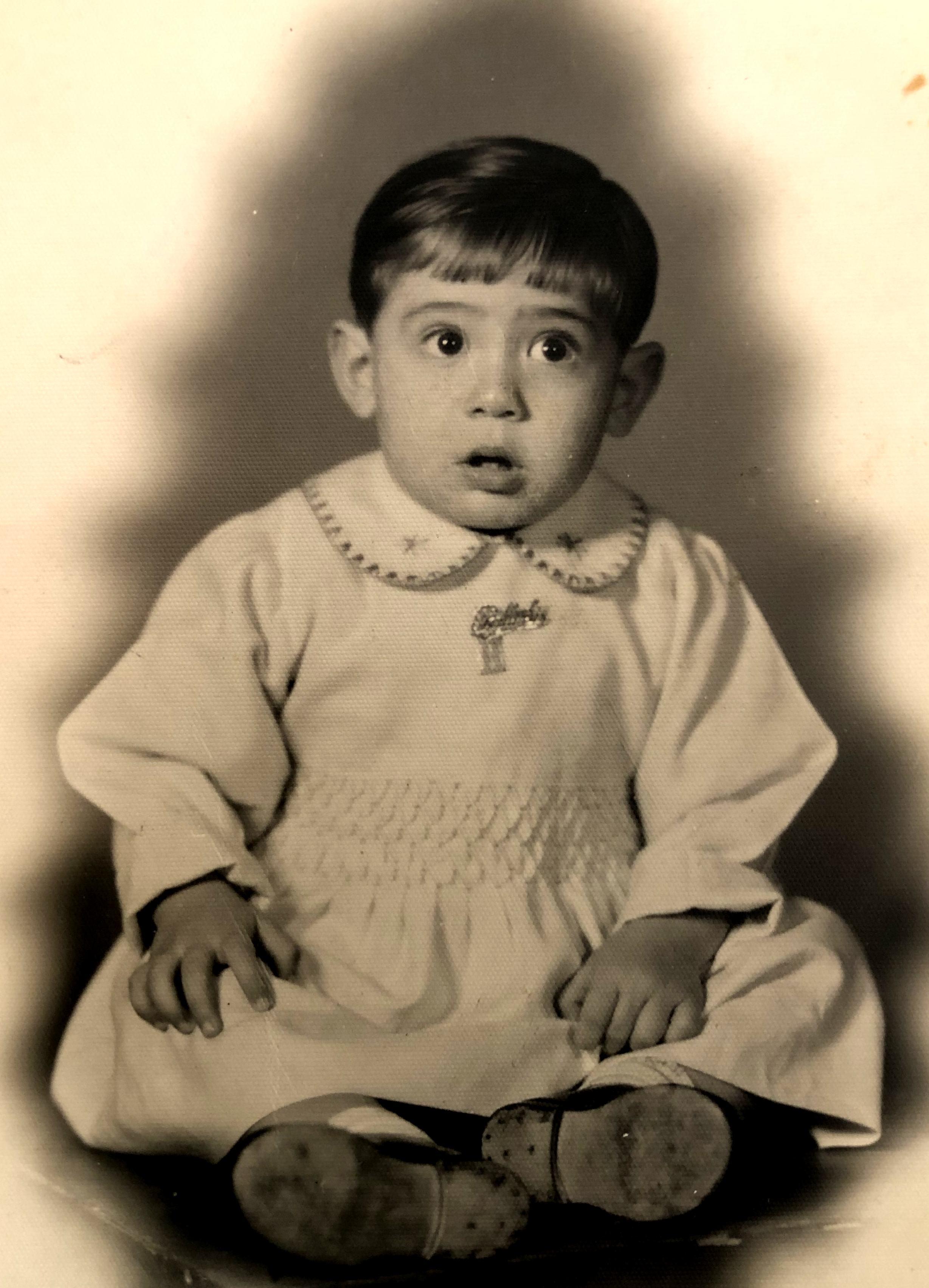 הילד אלי רונן בן שנה בשנת 1954